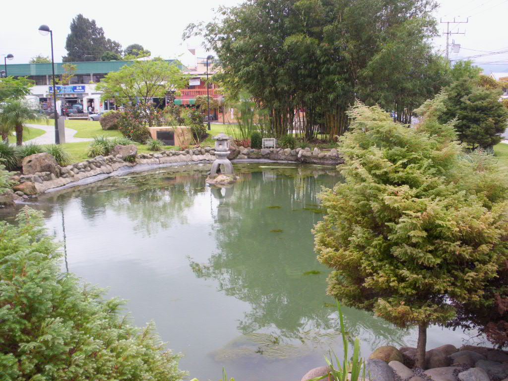 Parque Okayama en Curridabat, Costa Rica. Temática japonesa.